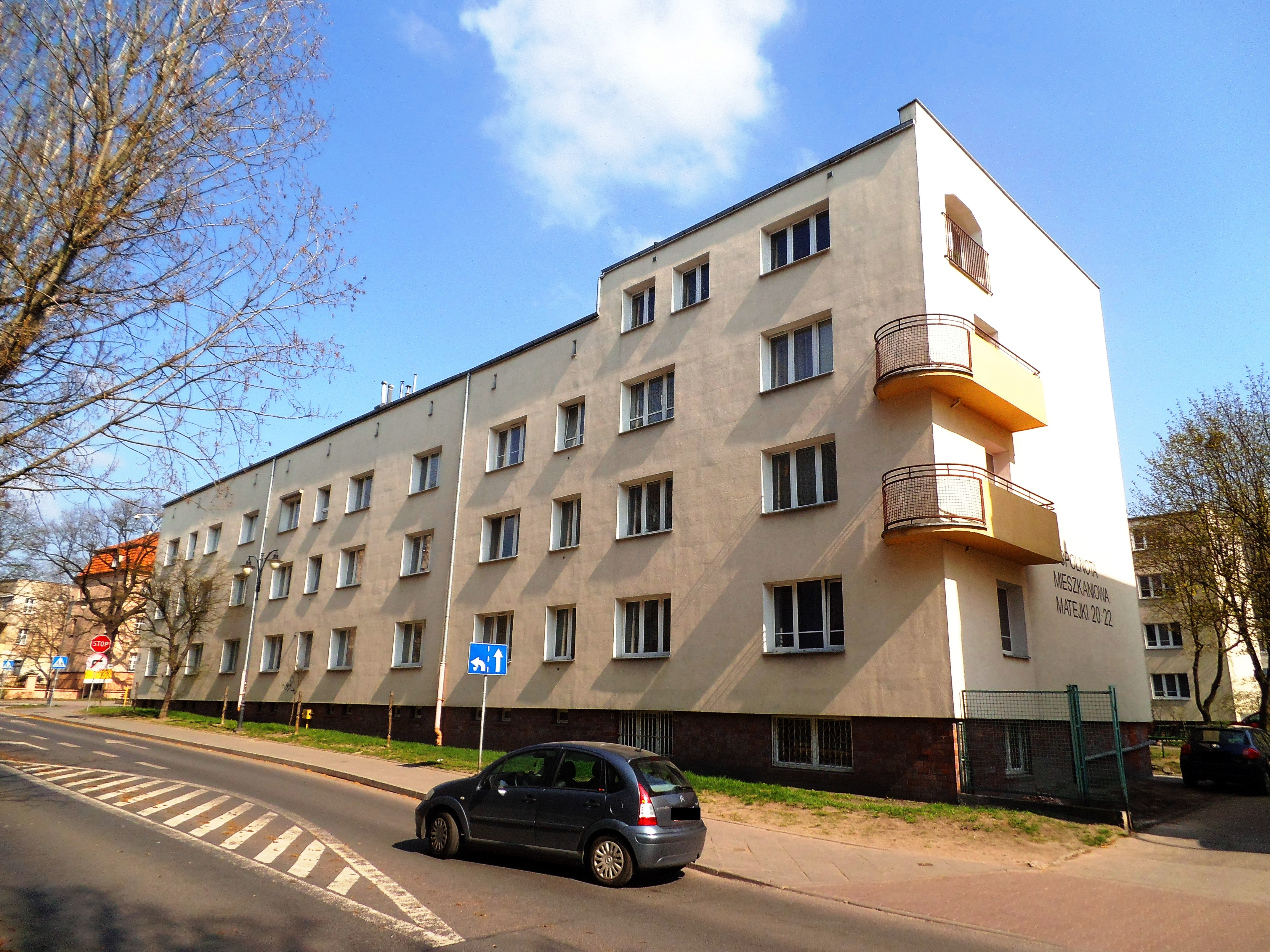 Osiedle Zusowskie w Toruniu